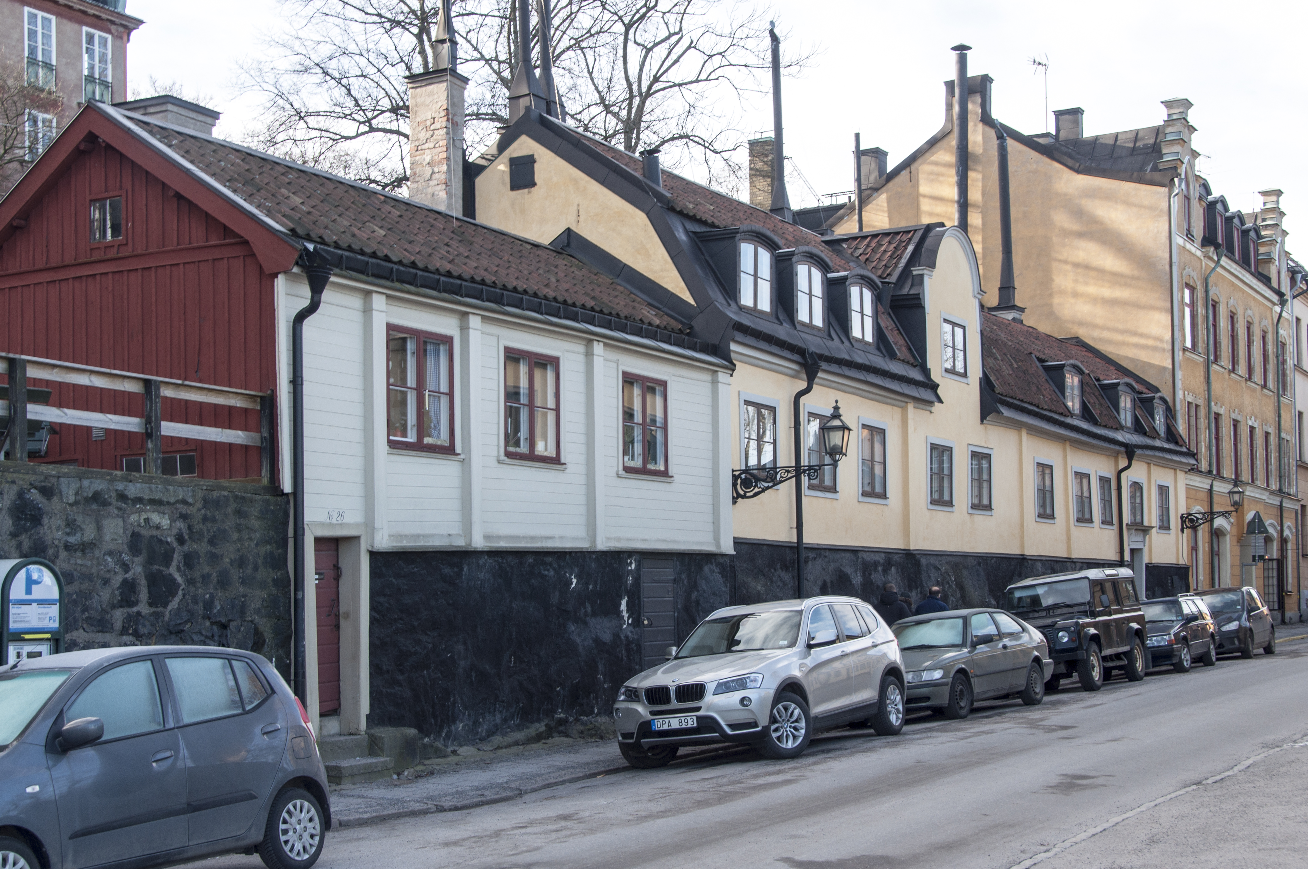 Fjällgatan 28-24